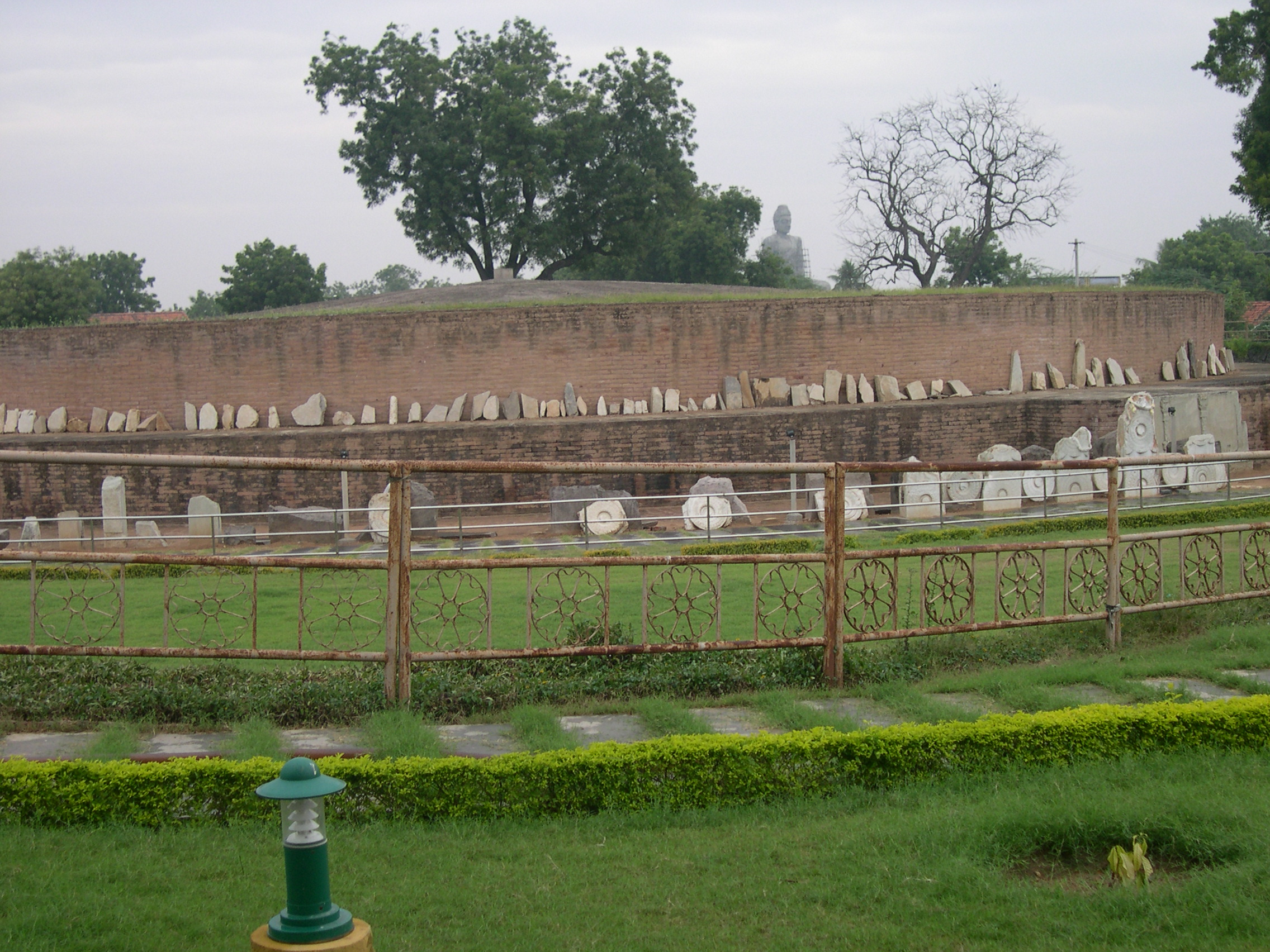 Amaravati Stupa, Guntur District